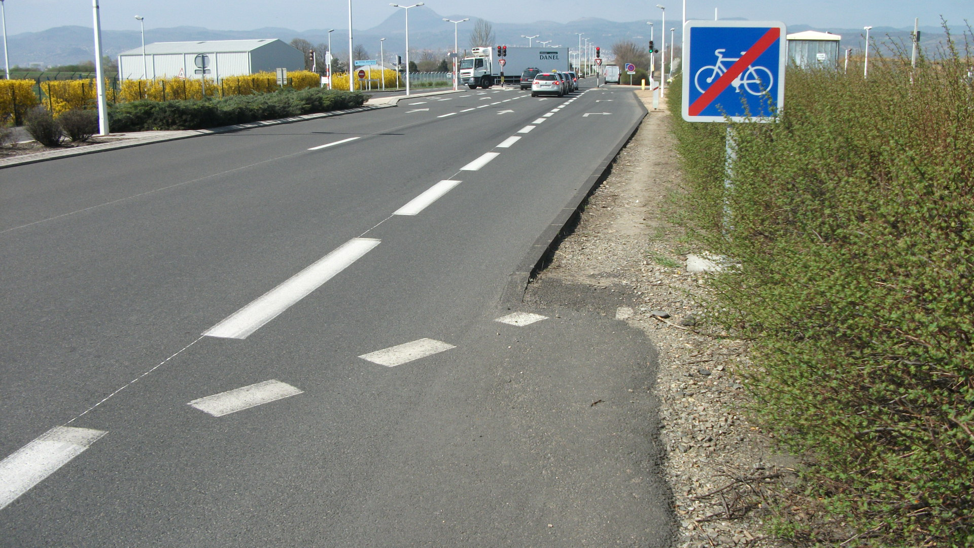 Panneau de fin de bande cyclable sur la D 769 à Clermont-Ferrand – Girod 2011